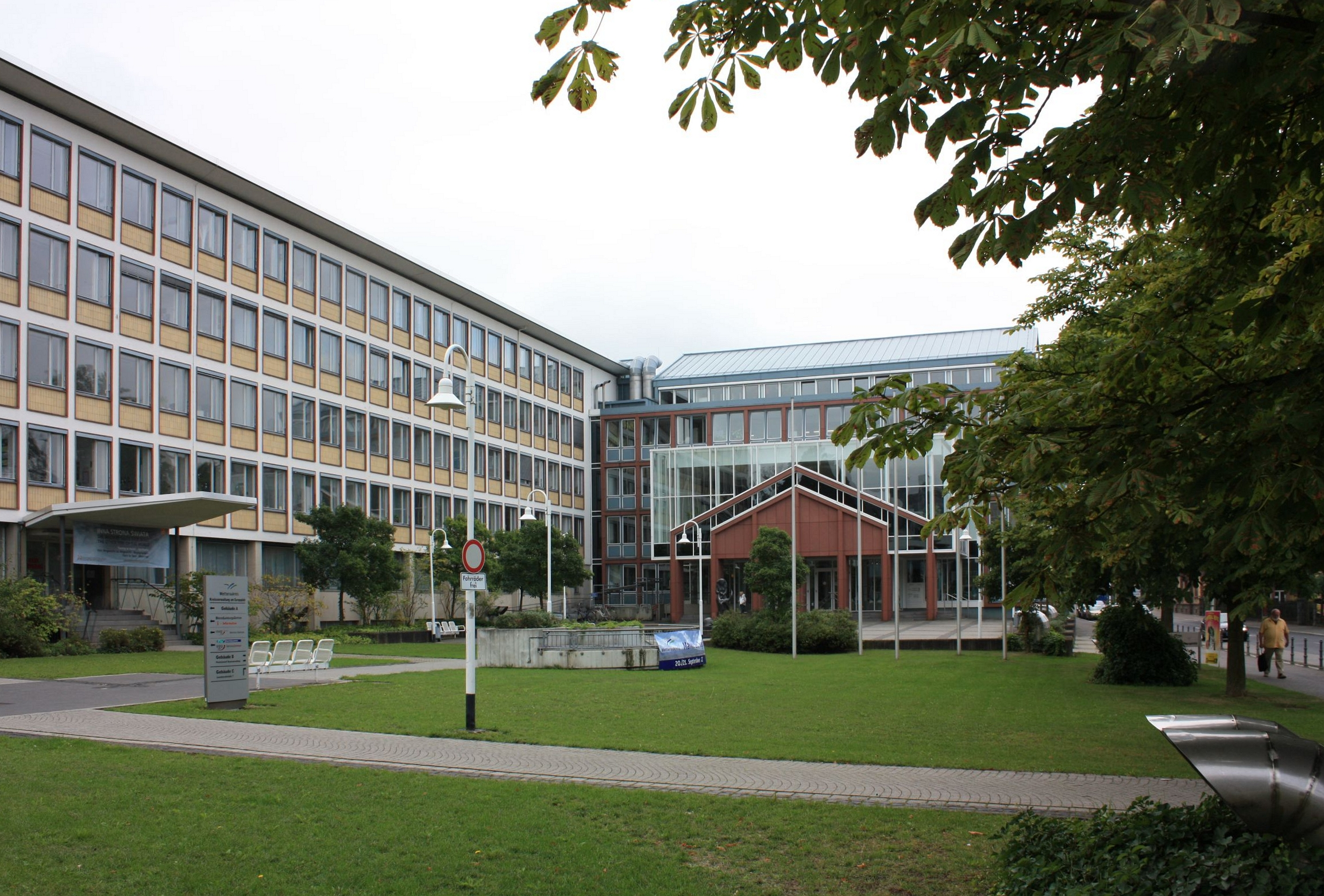 Kreisverwaltung des Wetteraukreises in Friedberg